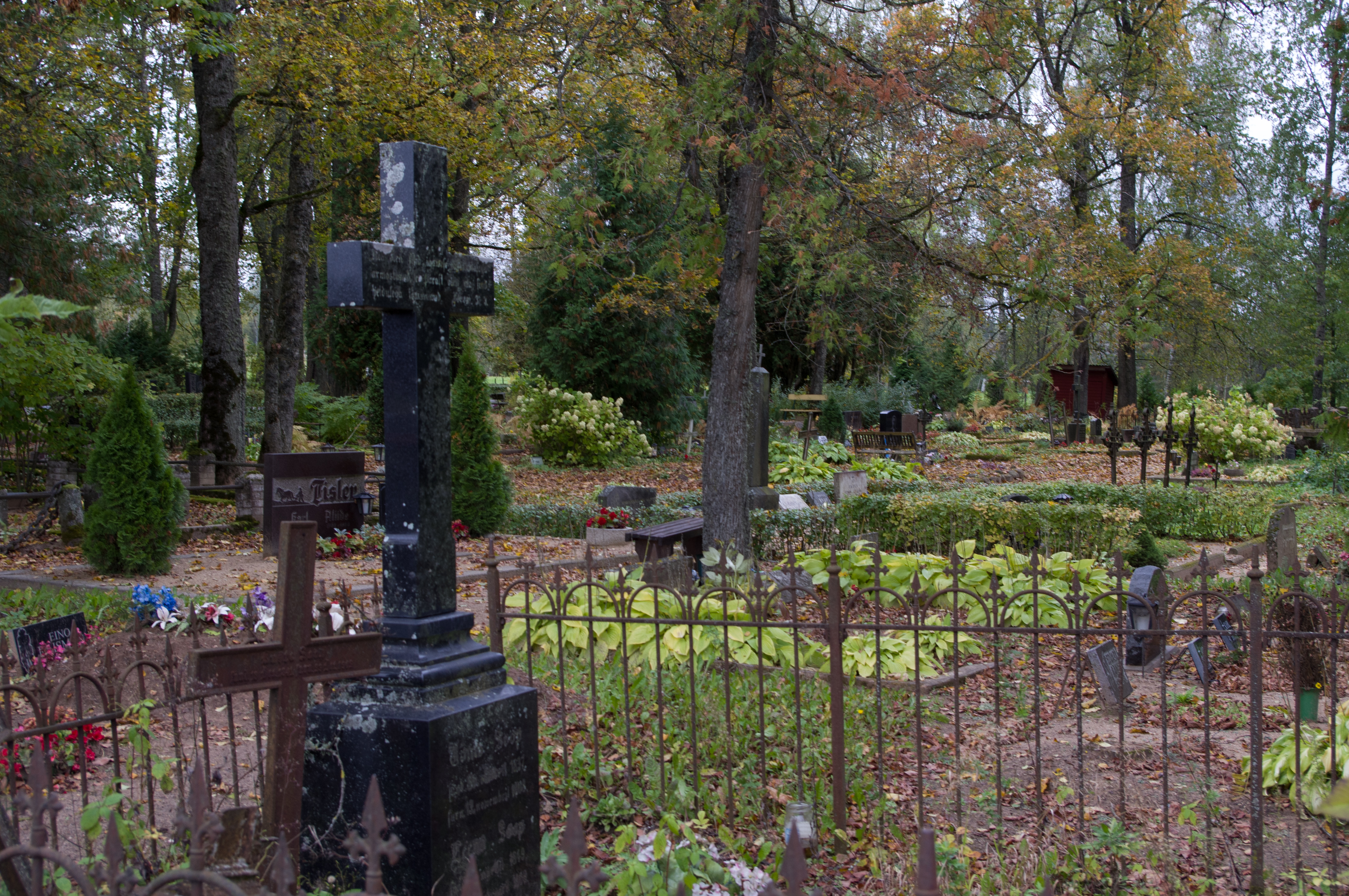 Kõpu kalmistu